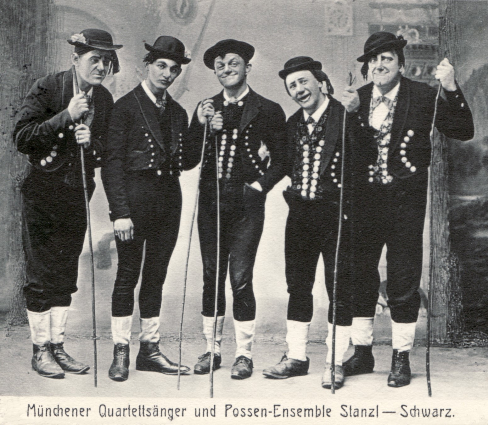 Possen-ensemble Stanz-Schwarz ca. 1905